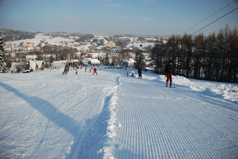 Sjezdovka v Trhové Kamenici